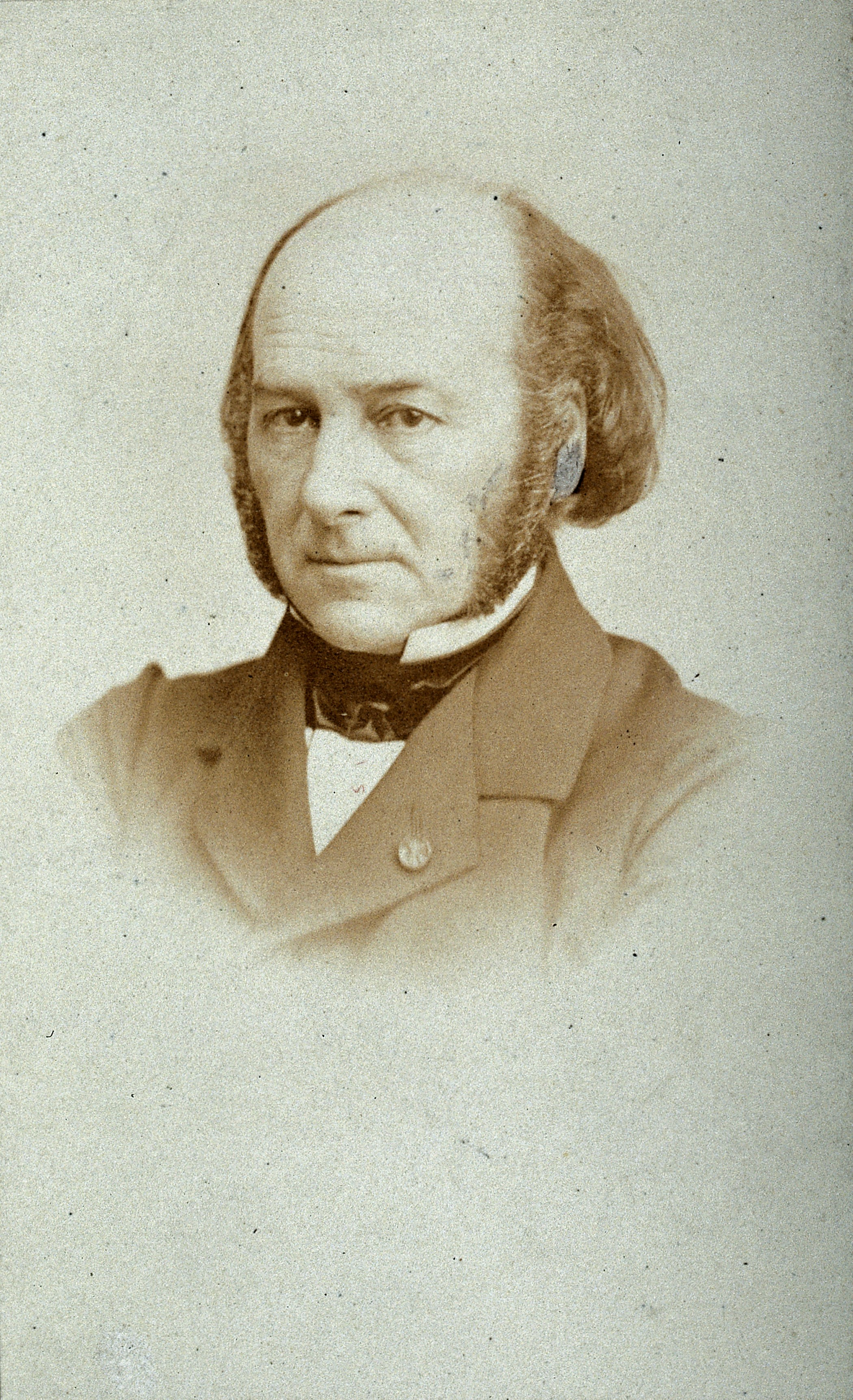 François-Achille Longet. Iconographic Collections Keywords: portrait photographs; Charles Reutlinger